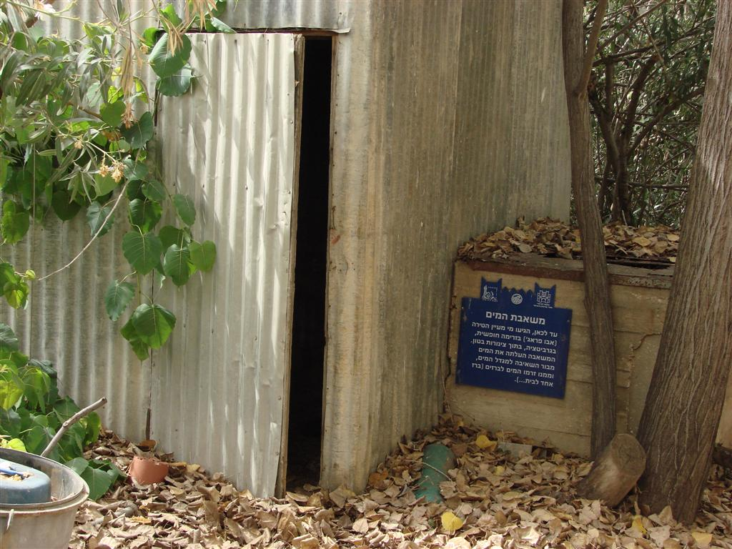 משאבת המים בטירת צבי 3